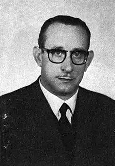 PIETRO LEONE (Caltanissetta 7 marzo 1917 - Verona 29 ottobre 1970)